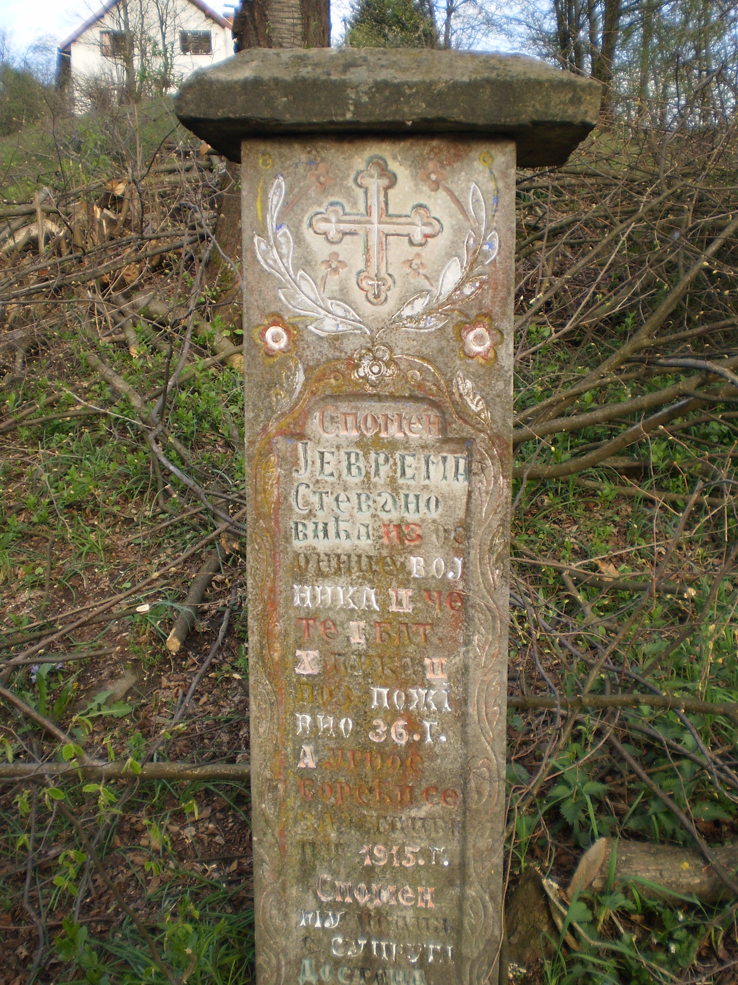 Српски (ћирилица): Споменик (Крајпуташ) Јеврему Стевановићу, 1915. Селиште